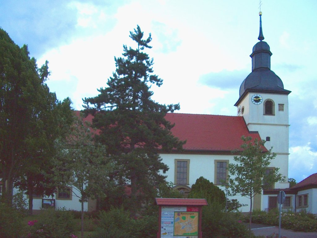 Die Kirche am Dorfmittelpunkt von Rannungen.